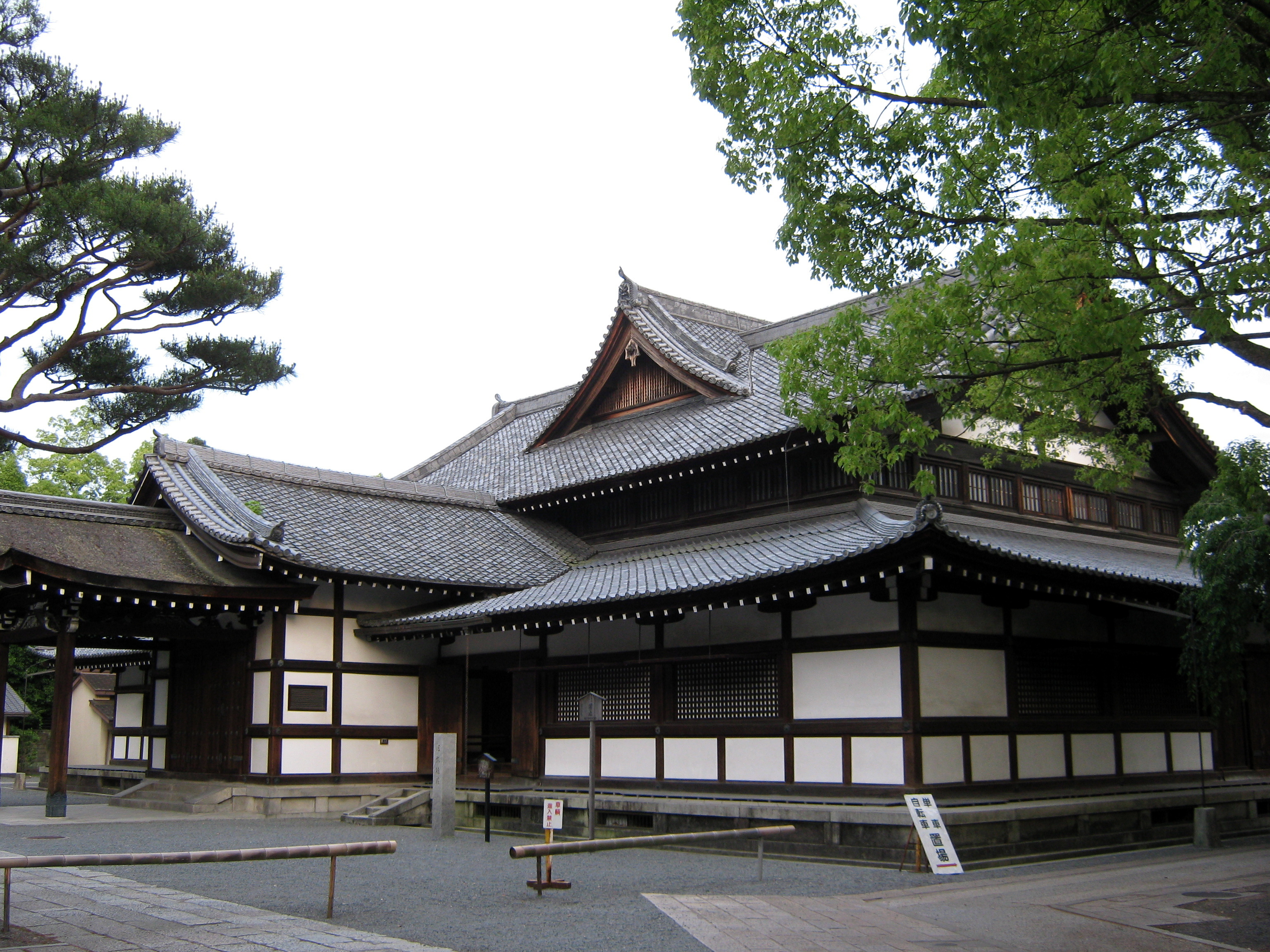 旧武徳殿，京都市左京区。著作者自身による撮影